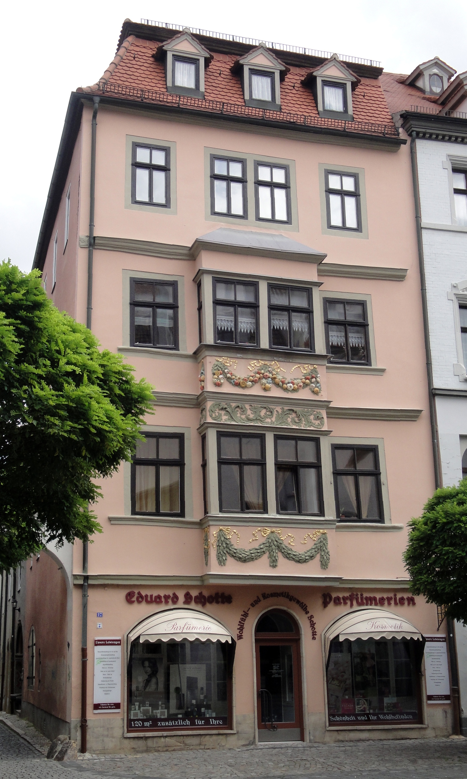 Naumburg (Saale)